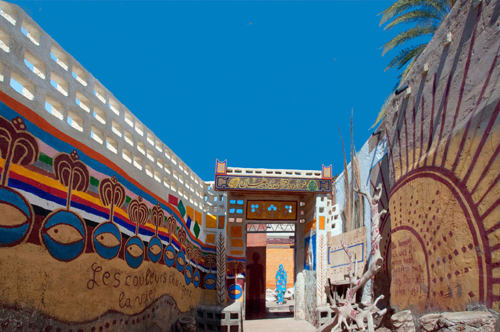 موزه و نگارخانه دکتر احمد نادعلیان در جزیره هرمز